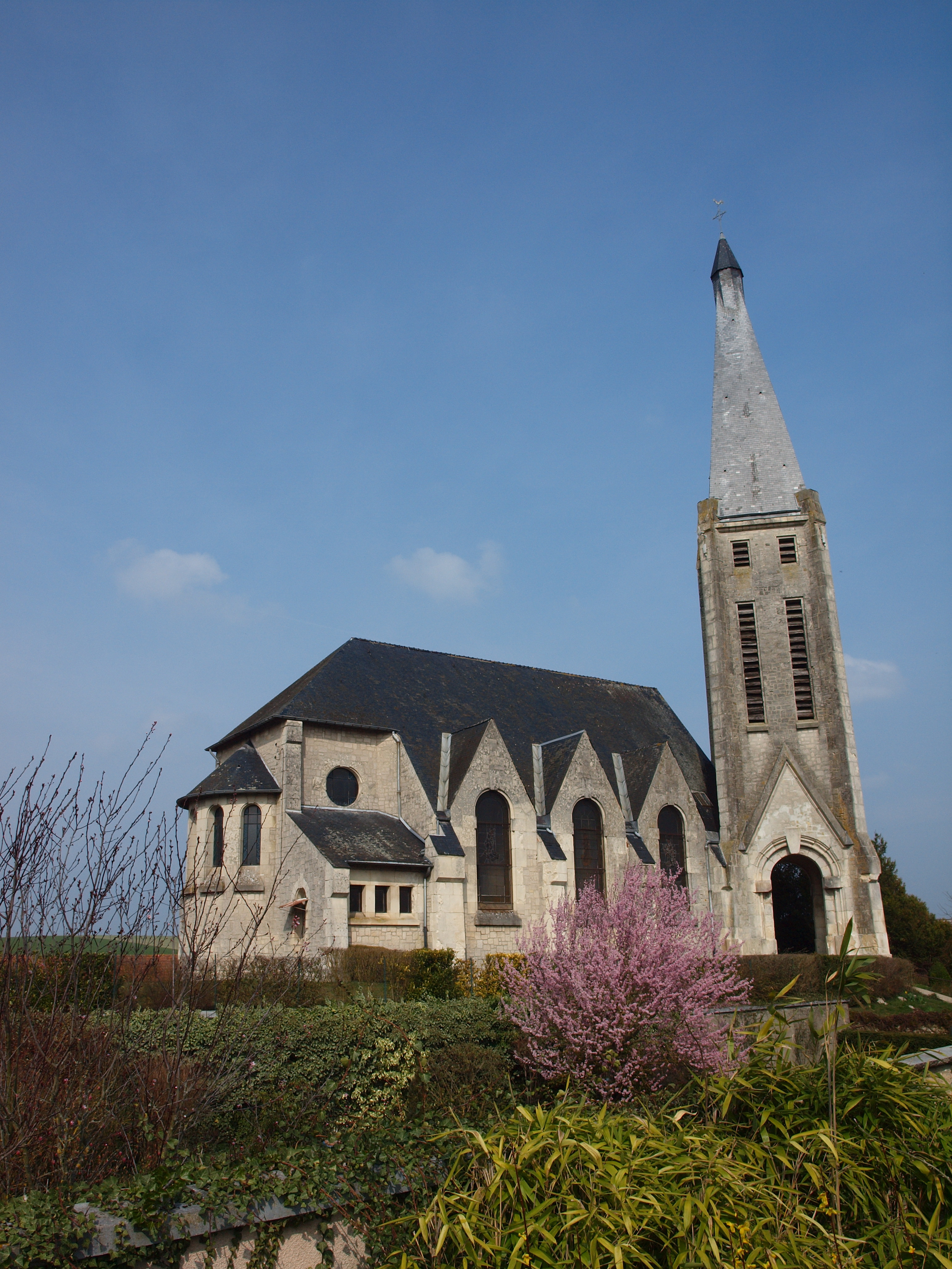 Église Saint-Martin de Manre (Ardennes, France)